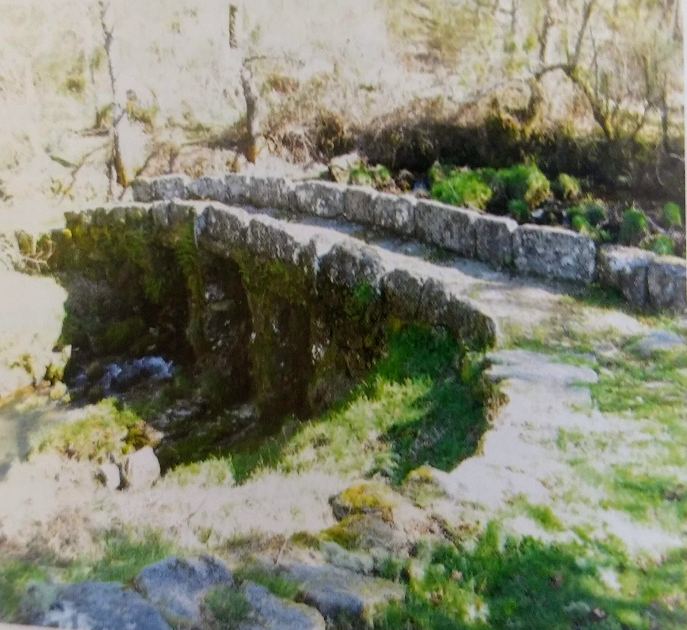 Cerca de este puente se encuentra un molino, seguramente esta construcción facilitaba el transporte de millo de esas épocas.